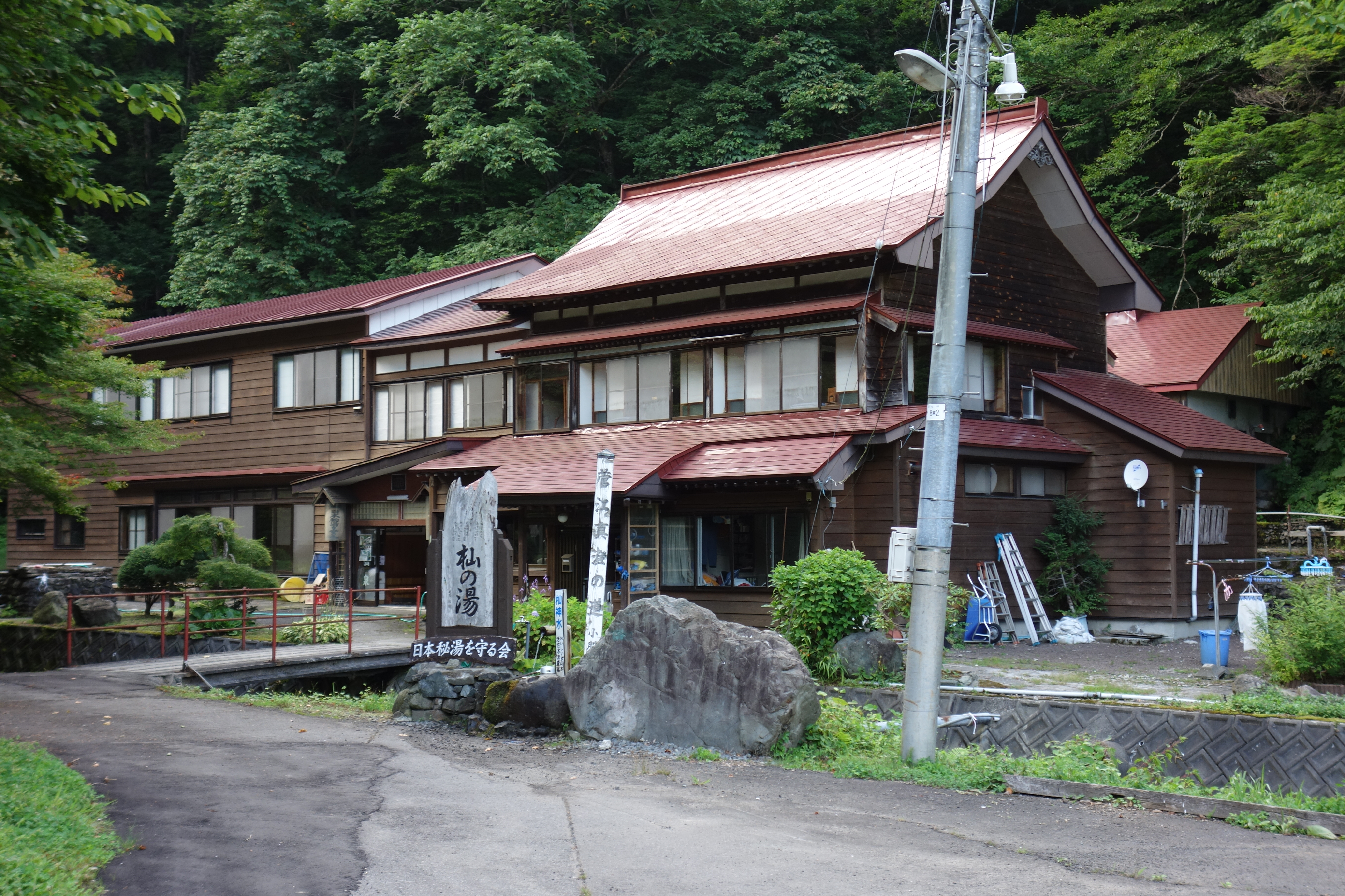 湯の沢湯本 杣温泉旅館